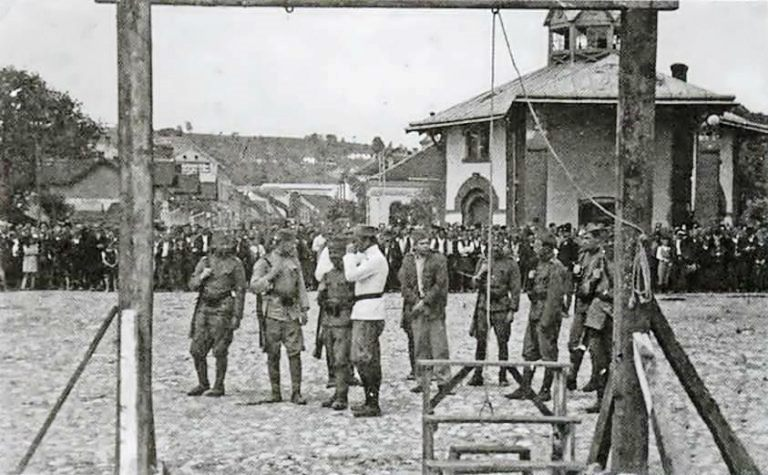 Izvođenje na javno vešanje narodnog heroja Stejpana Steve Filipovića 22. maja 1942. godine